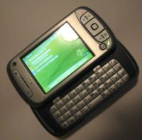 HTC TyTN mobile phone.